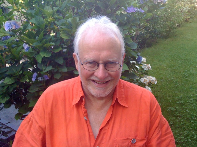 Personenfoto Asmus Finzen